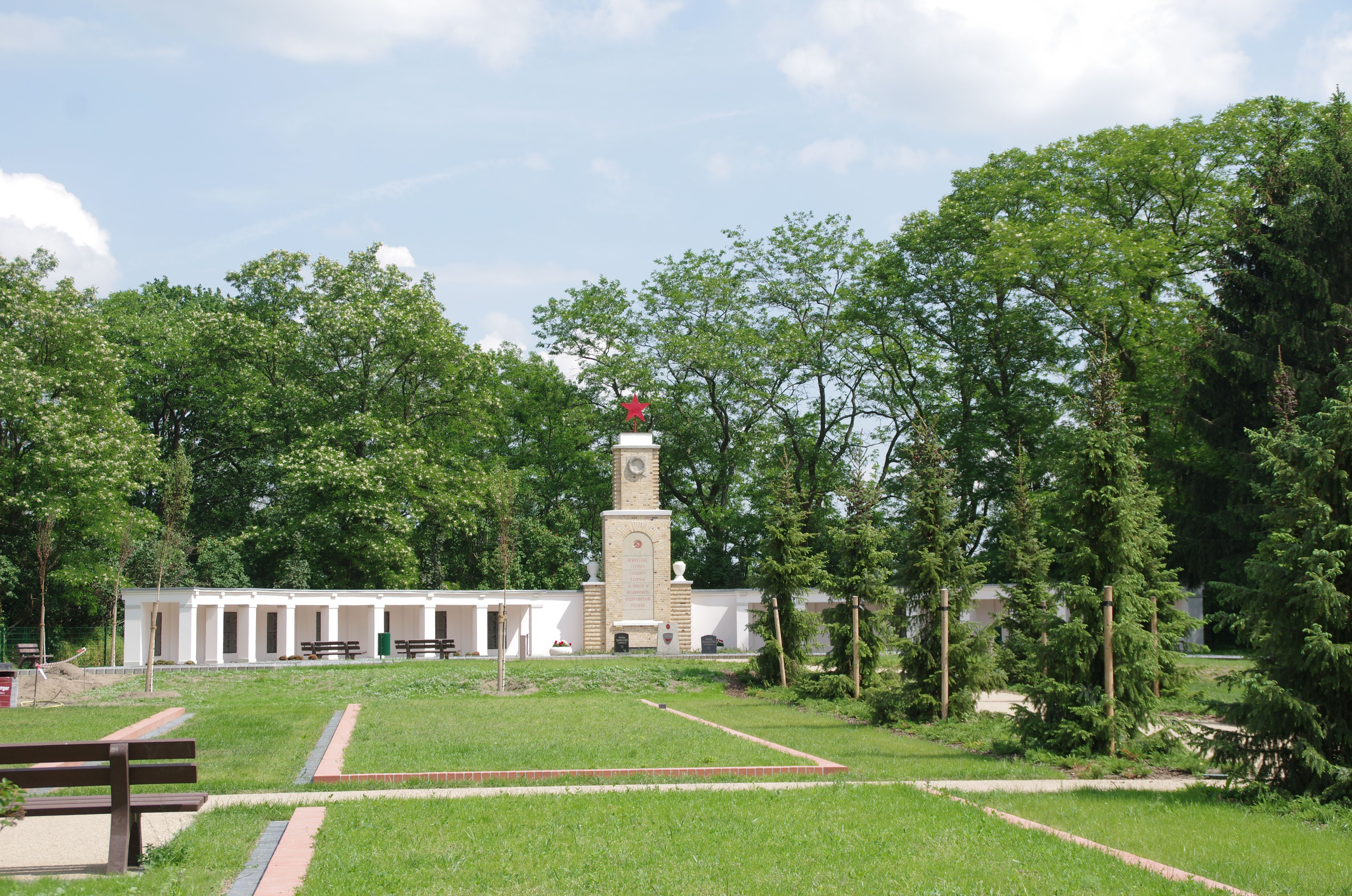 Lebus in Brandenburg. Das Sowjetische Ehrendenkmal auf dem Postberg steht unter Denkmalschutz.